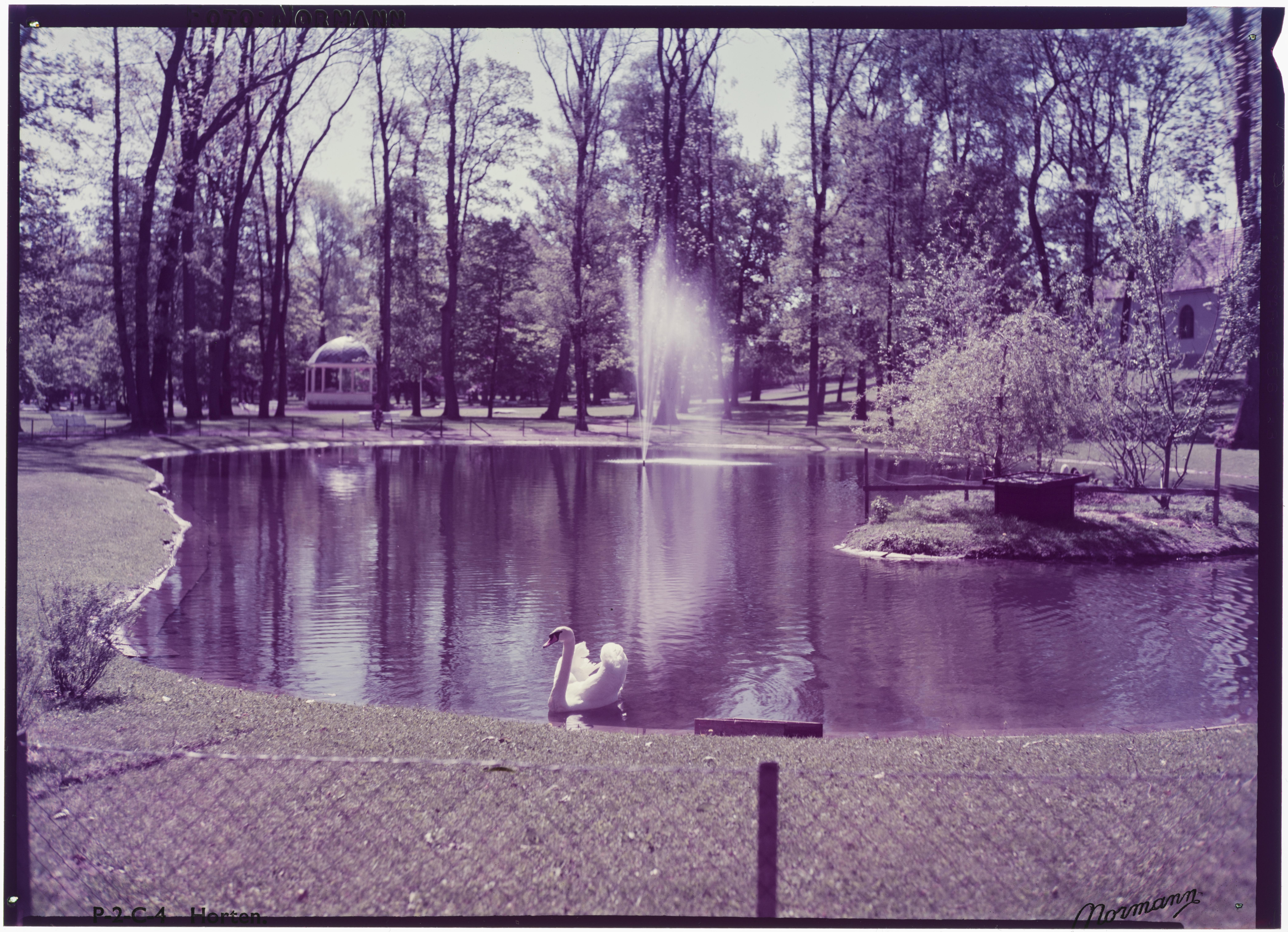 Bildet er hentet fra Nasjonalbibliotekets bildesamling. Anmerkninger til bildet var: Tittel er hentet fra emballasje. Horten, Horten, Vestfold